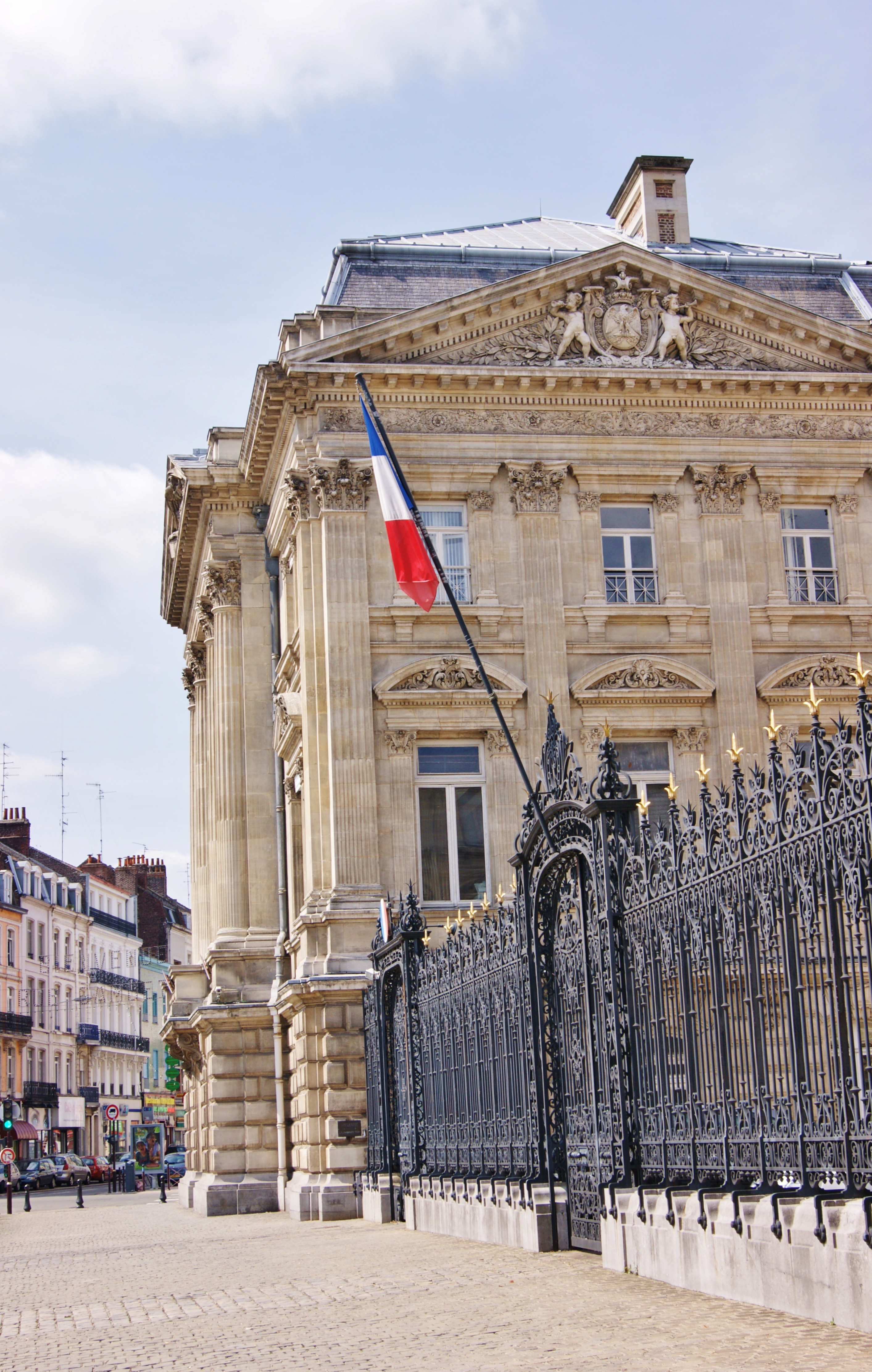 Préfecture de Lille, Place de la république .